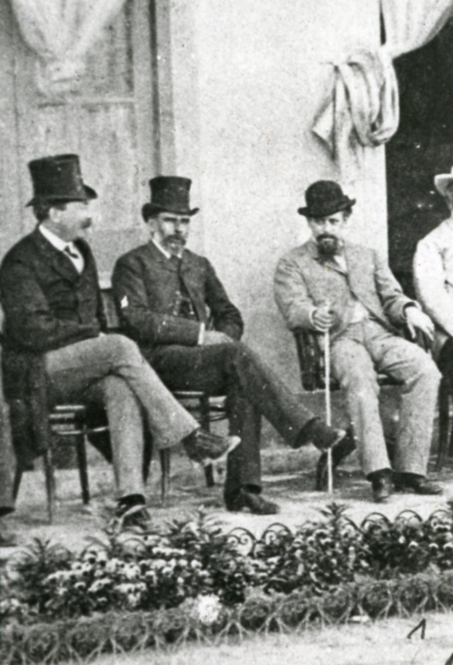 Es una foto de dos importantes dirigentes políticos de los años 1880: Julio Argentino Roca (derecha) con Carlos Pellegrini (izquierda).